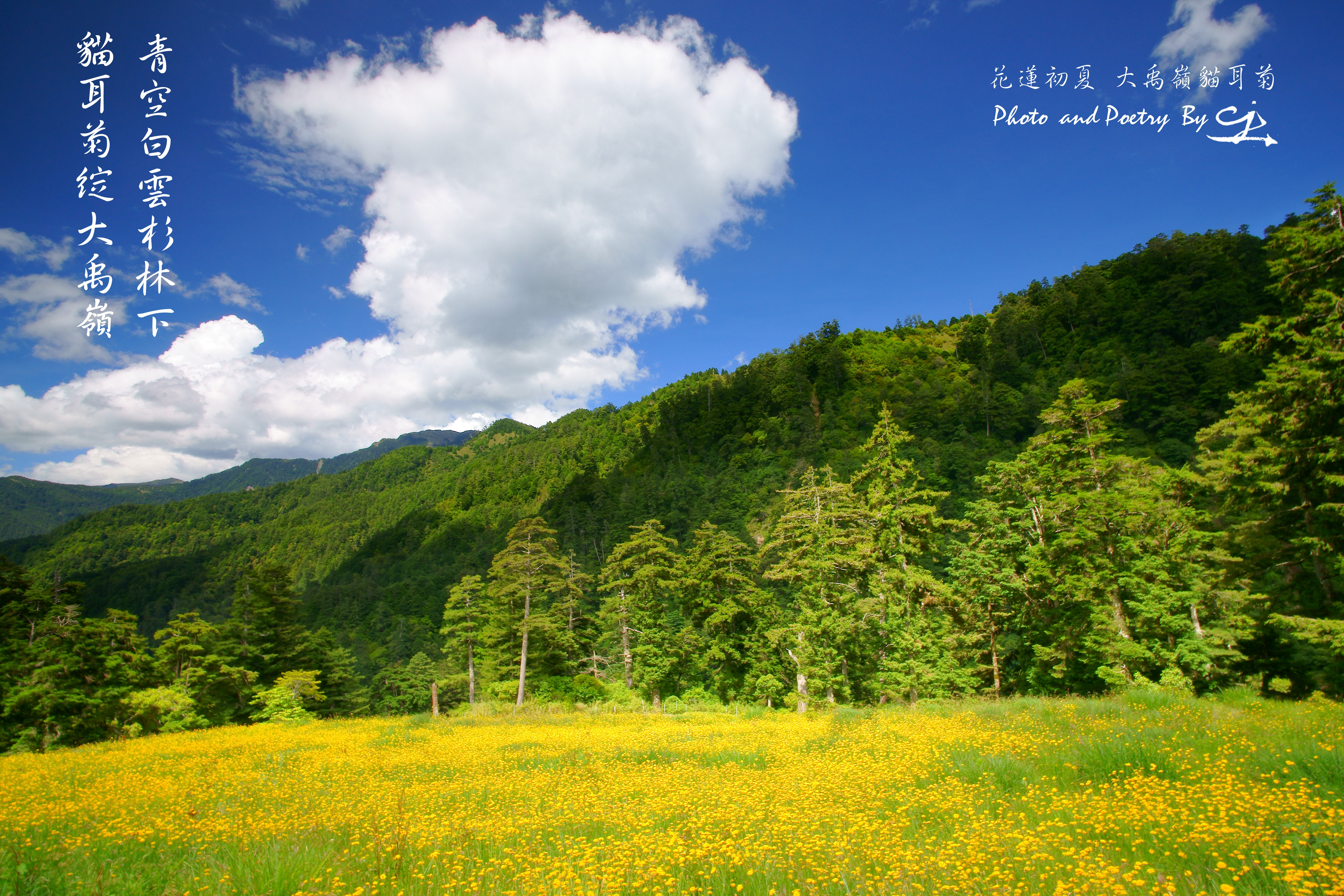 大禹嶺歸化農地